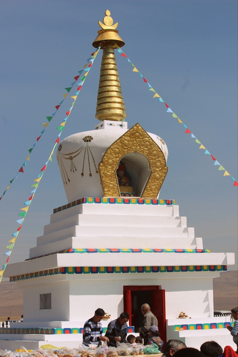 Буддийский субурган (ступа) в честь основателя Иволгинского дацана Хамбо ламы Лубсан Нимы Дармаева на его малой родине - в местности Дабааны Ама в селе Нижний Бургалтай Джидинского района Бурятии.